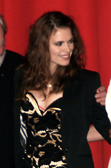 Hayley Atwell bei der Premiere von Die Säulen der Erde